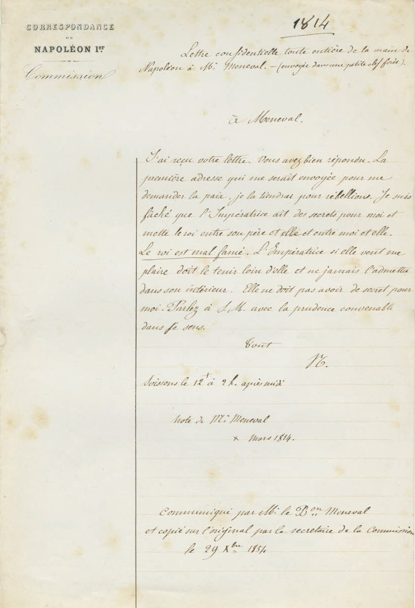 Copie, effectuée en 1854, d'une lettre confidentielle de Napoléon Ier à Claude François de Méneval, rédigée au sein du cabinet secret pendant la campagne de France